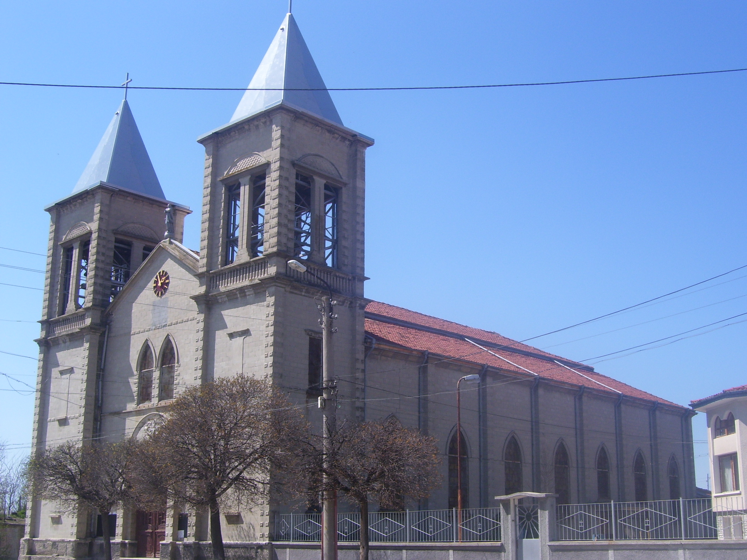 Католическа църква в Житница, Пловдивско, България.